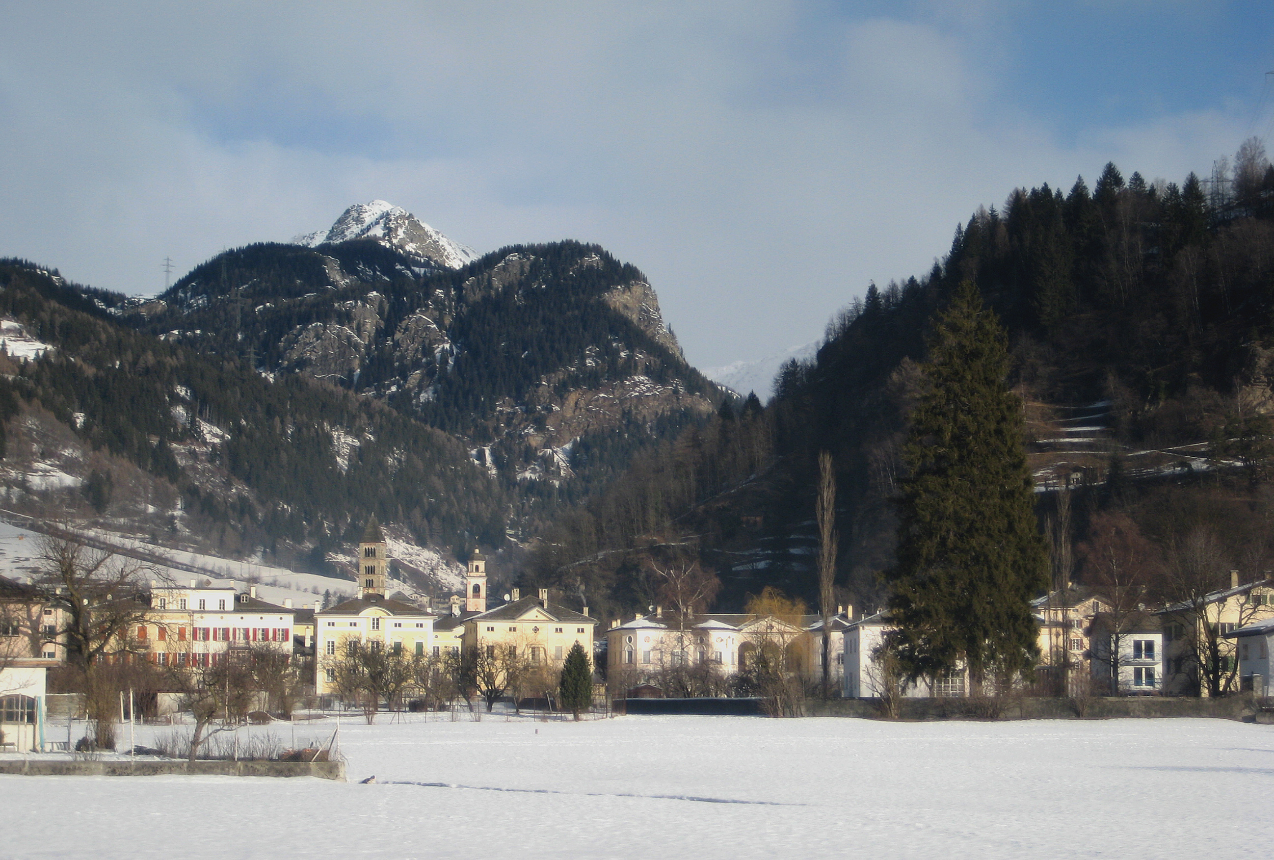 Poschiavo von Süden mit den Spanischen Häusern